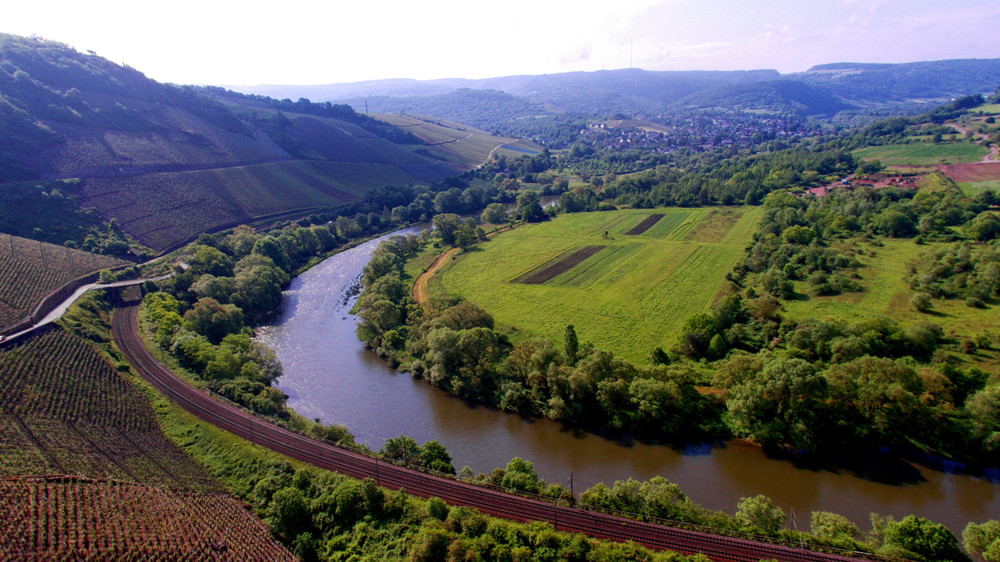 (NSG:RP-7235-051)_Wiltinger Saarbogen Blick von der Wiltinger Kupp in Richtung Wiltingen